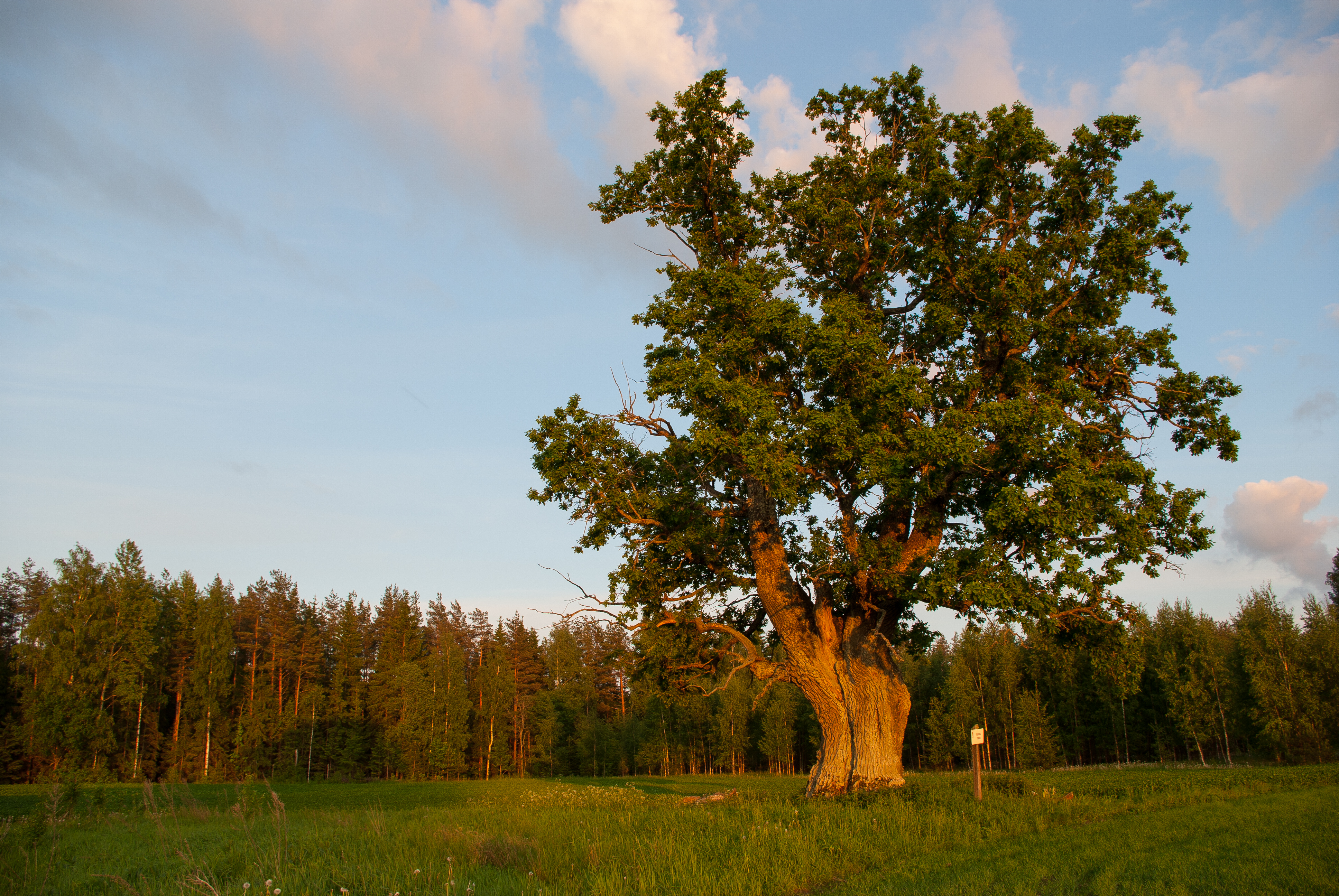 Ruuga tamm